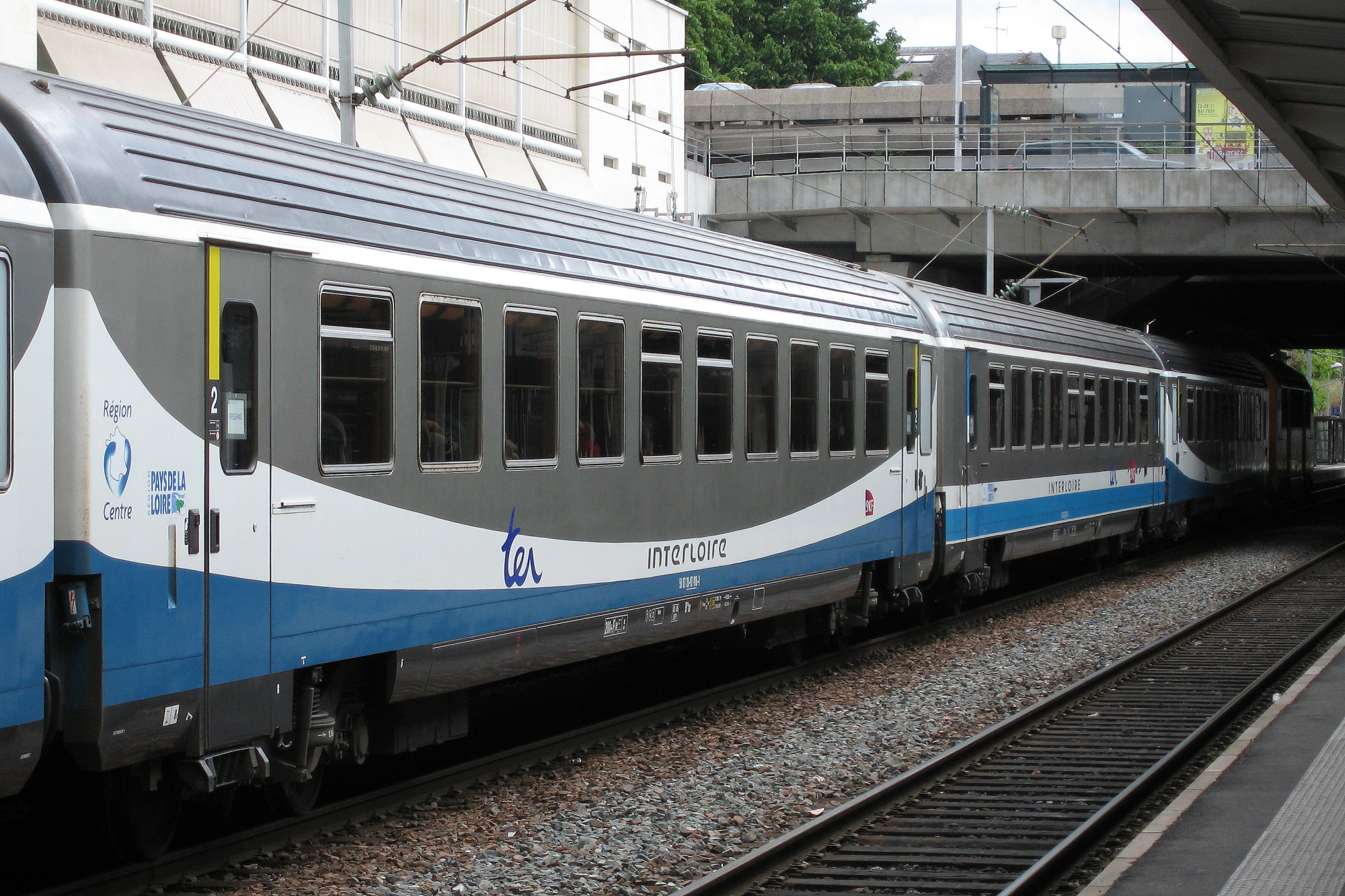 L'interloire avec au premier plan, une voiture rénovée, au second plan, une voiture non rénovée; en gare d'Angers